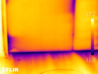 Thermogramme permettant de visualiser des fuites d'air en partie basse d'une porte en l'absence de seuil, lors d'un essai d'infiltrométrie.